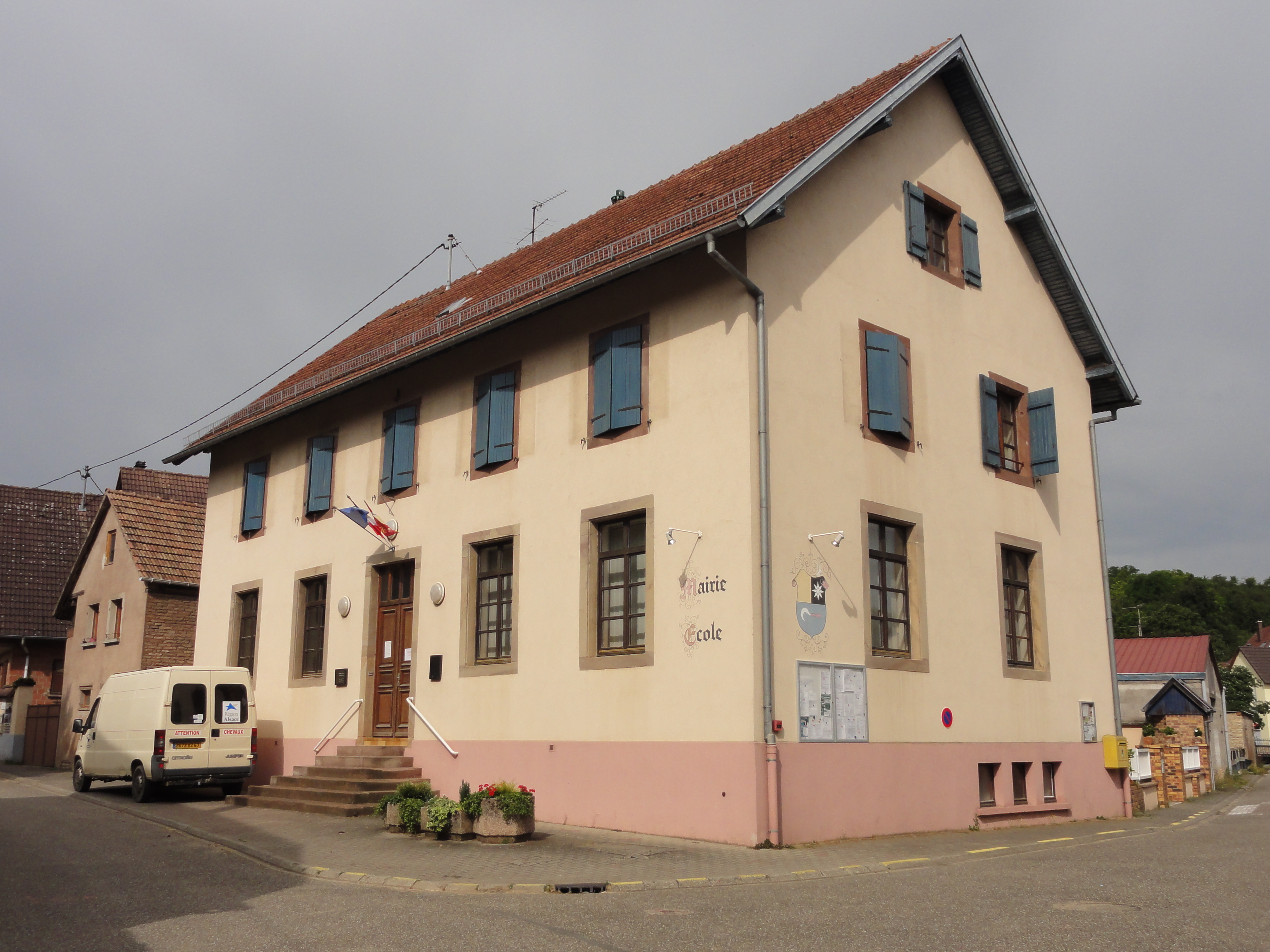 Alsace, Bas-Rhin, Wintzenheim-Kochersberg, Mairie-école.